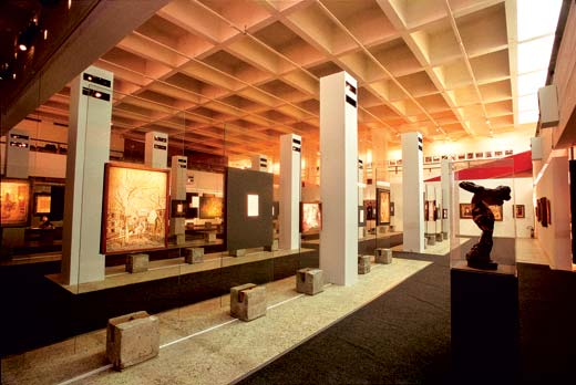 Segundo subsolo do Museu de Arte de São Paulo, com obras impressionistas do acervo.